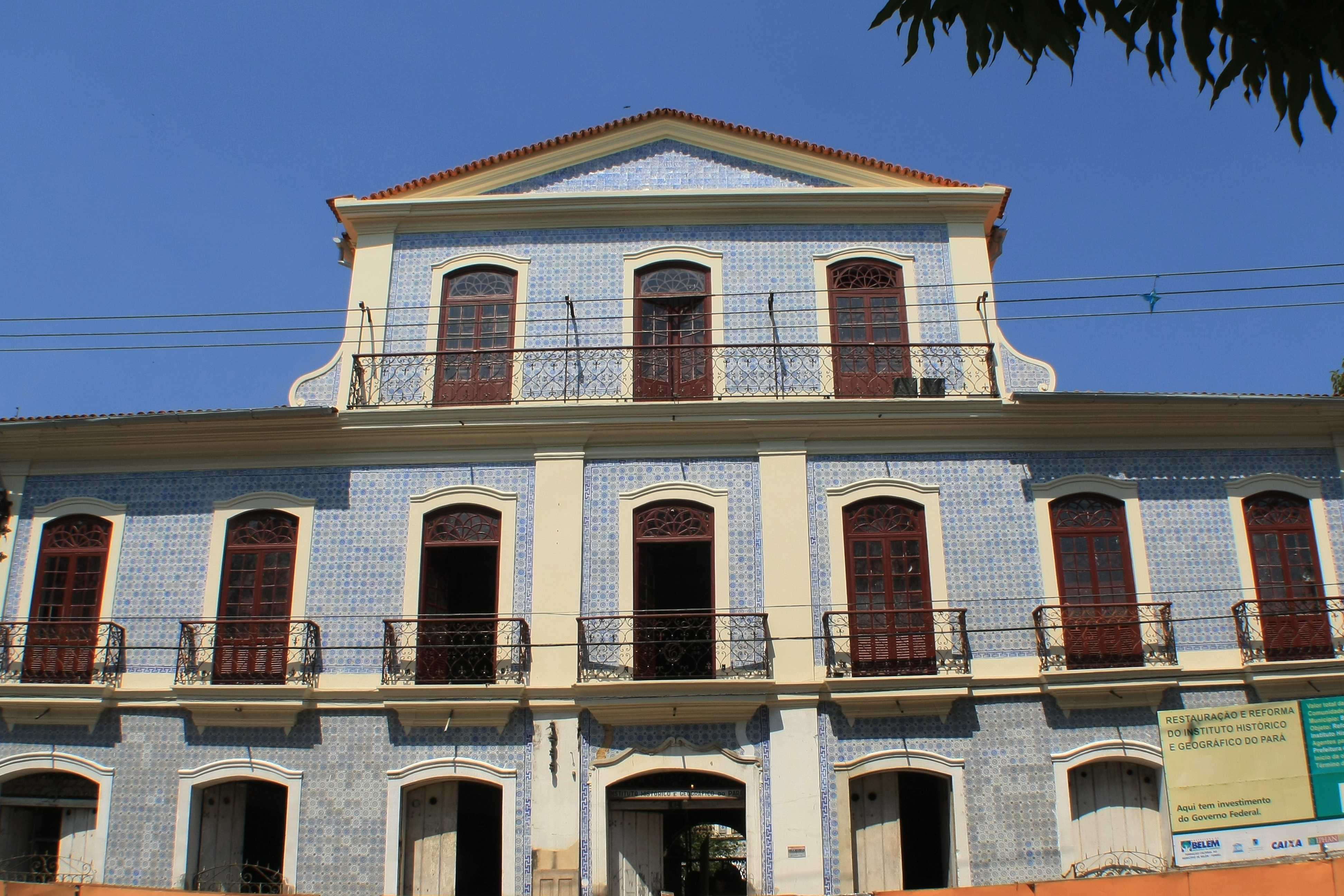 instituto histórico e geografico do pará